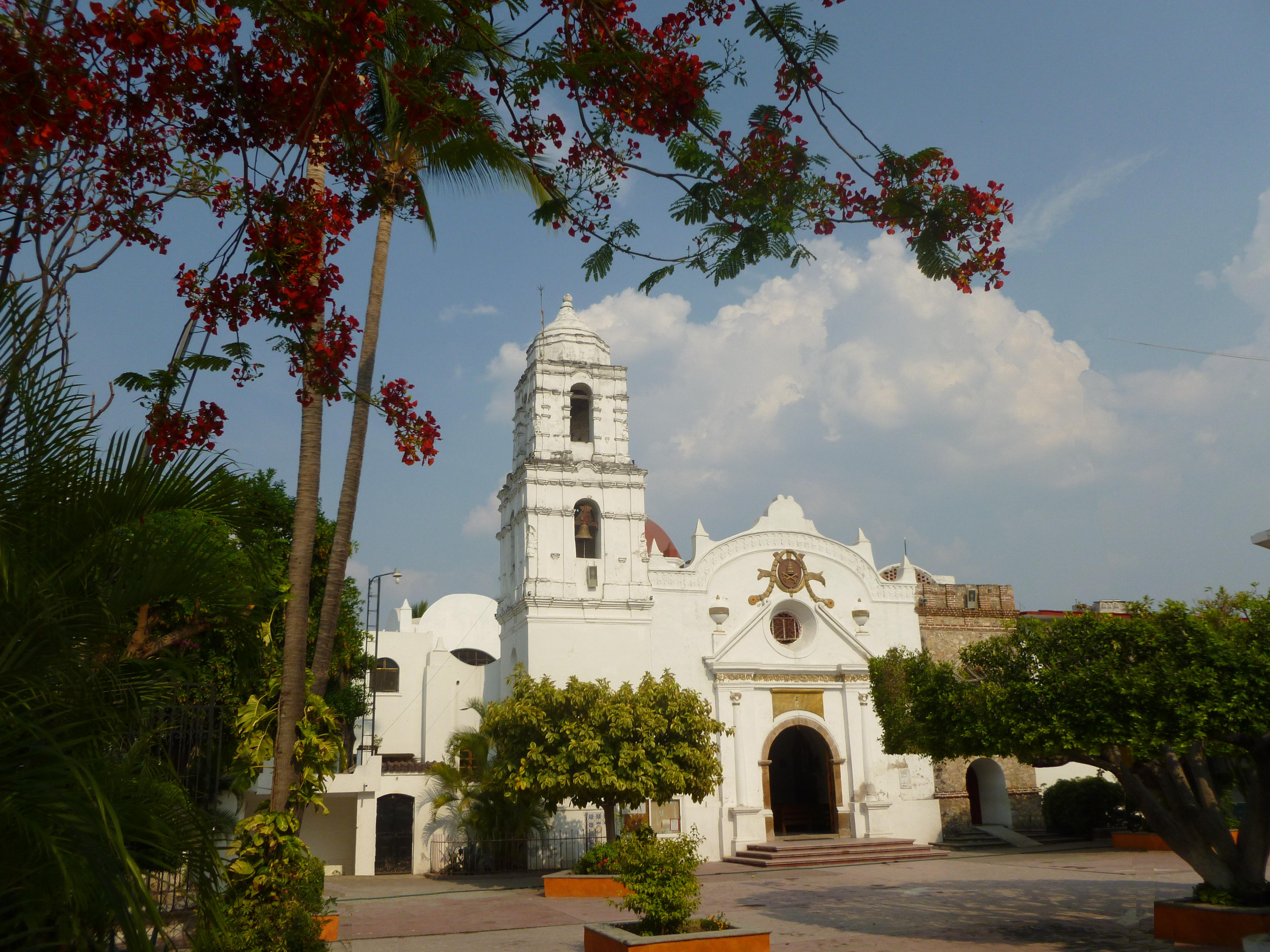 Templo dedicado al Apostol San Pedro en Tehuixtla el templo originalmente es del siglo XVII, pero su fachada principal data del Siglo XVIII.